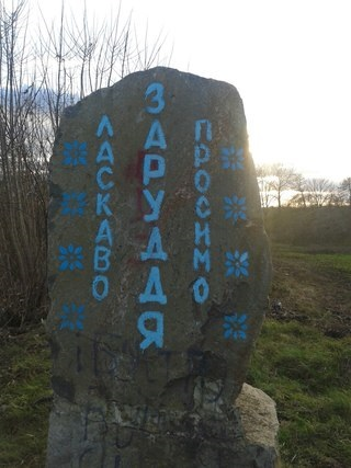 Заруддя